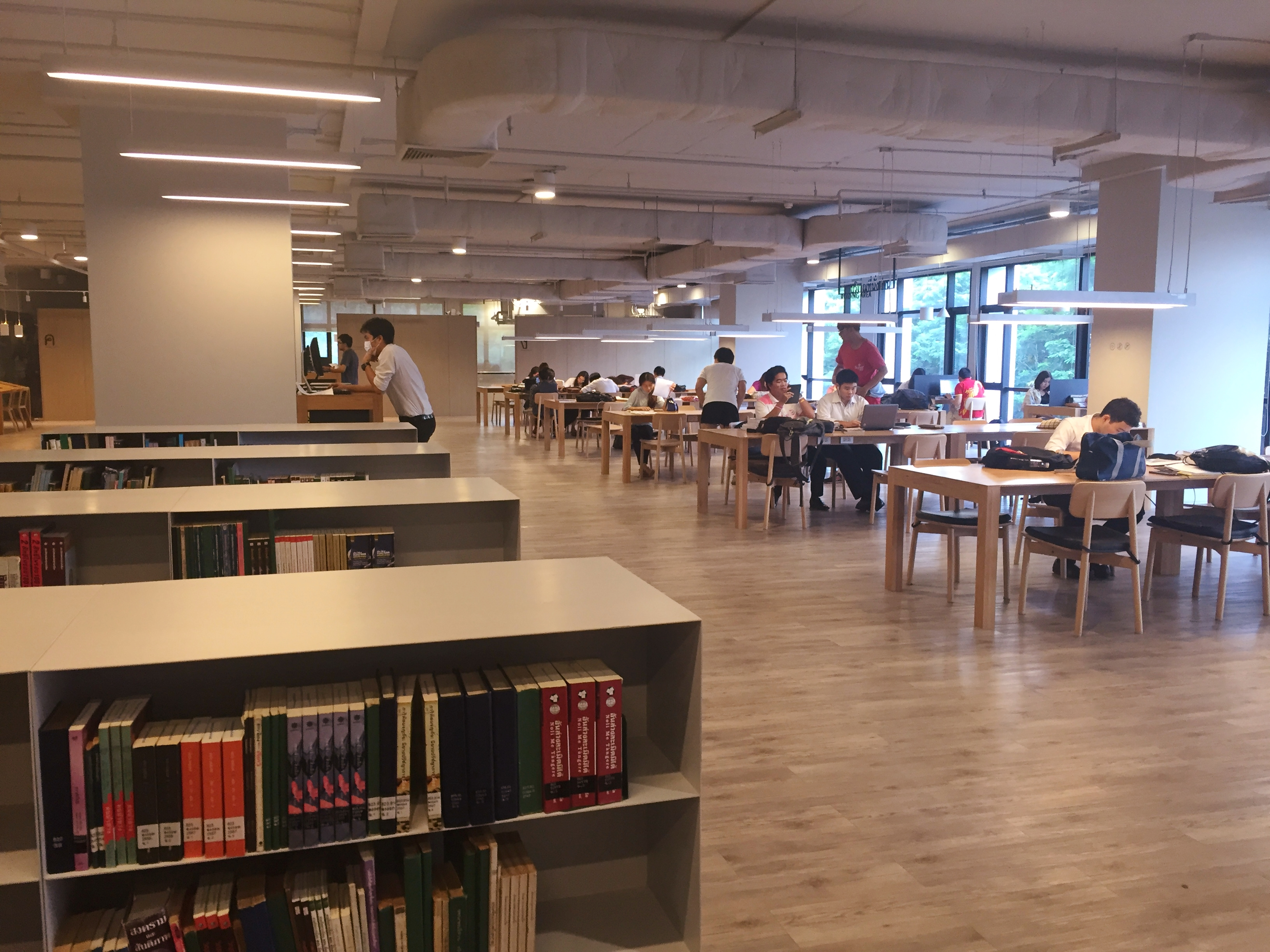 ห้องสมุดรูฟุส ดี. สมิธ และ ชำนาญ ยุวบูรณ์ ห้องสมุดประจำคณะรัฐศาสตร์ จุฬาลงกรณ์มหาวิทยาลัย